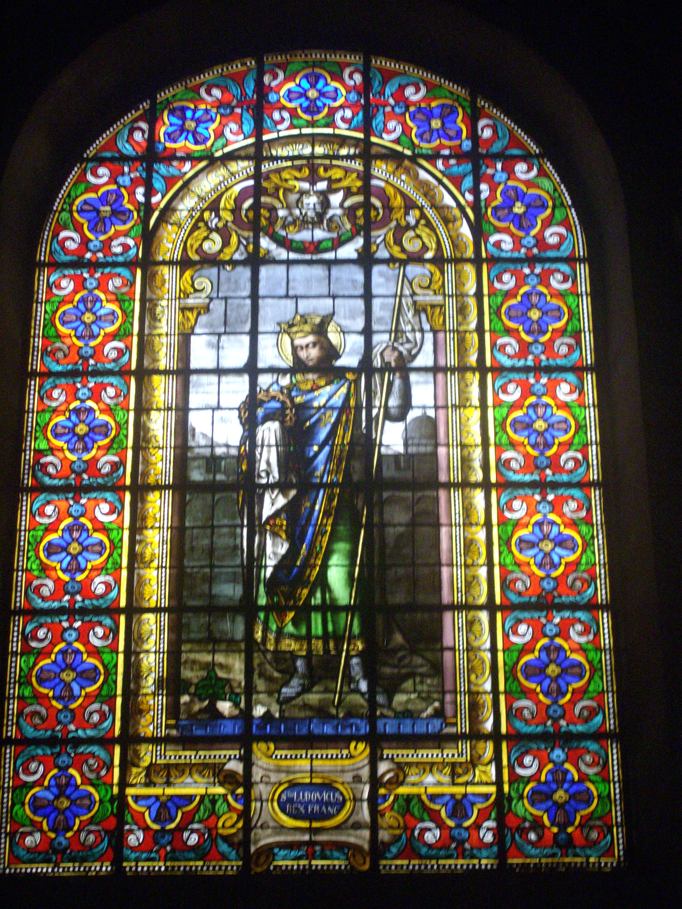 Vue intérieure de la Cathédrale Notre-Dame-de-l'Assomption de Montauban, vitrail de la chapelle de saint Louis .